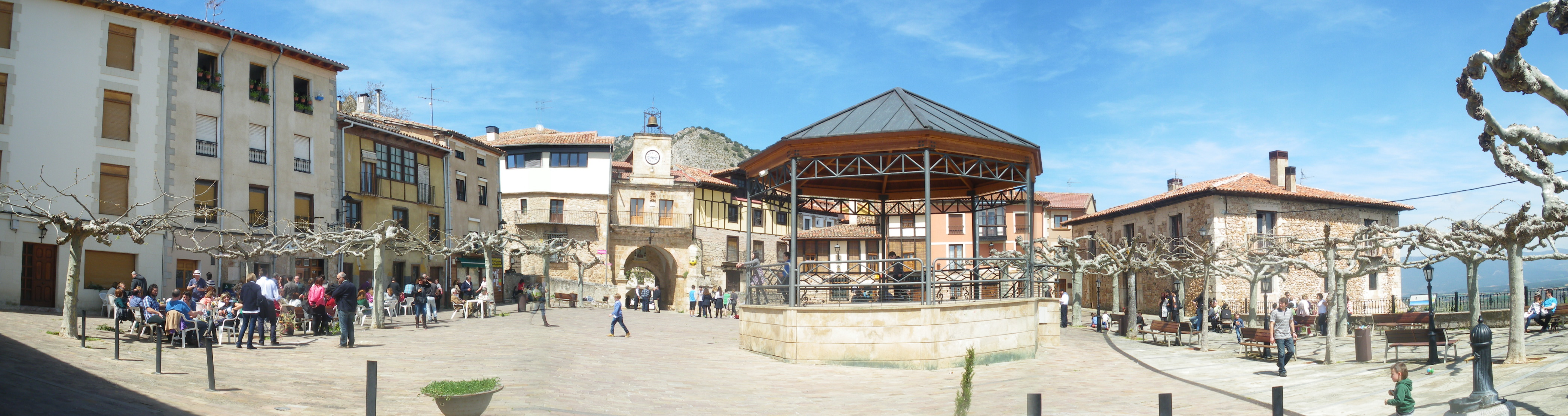 Poza de la Sal, provincia de Burgos, Castilla y León, España.